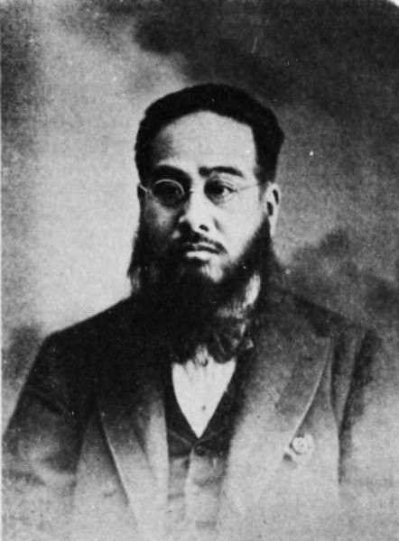 十二代絲原武太郎（１８５３～１９１１）